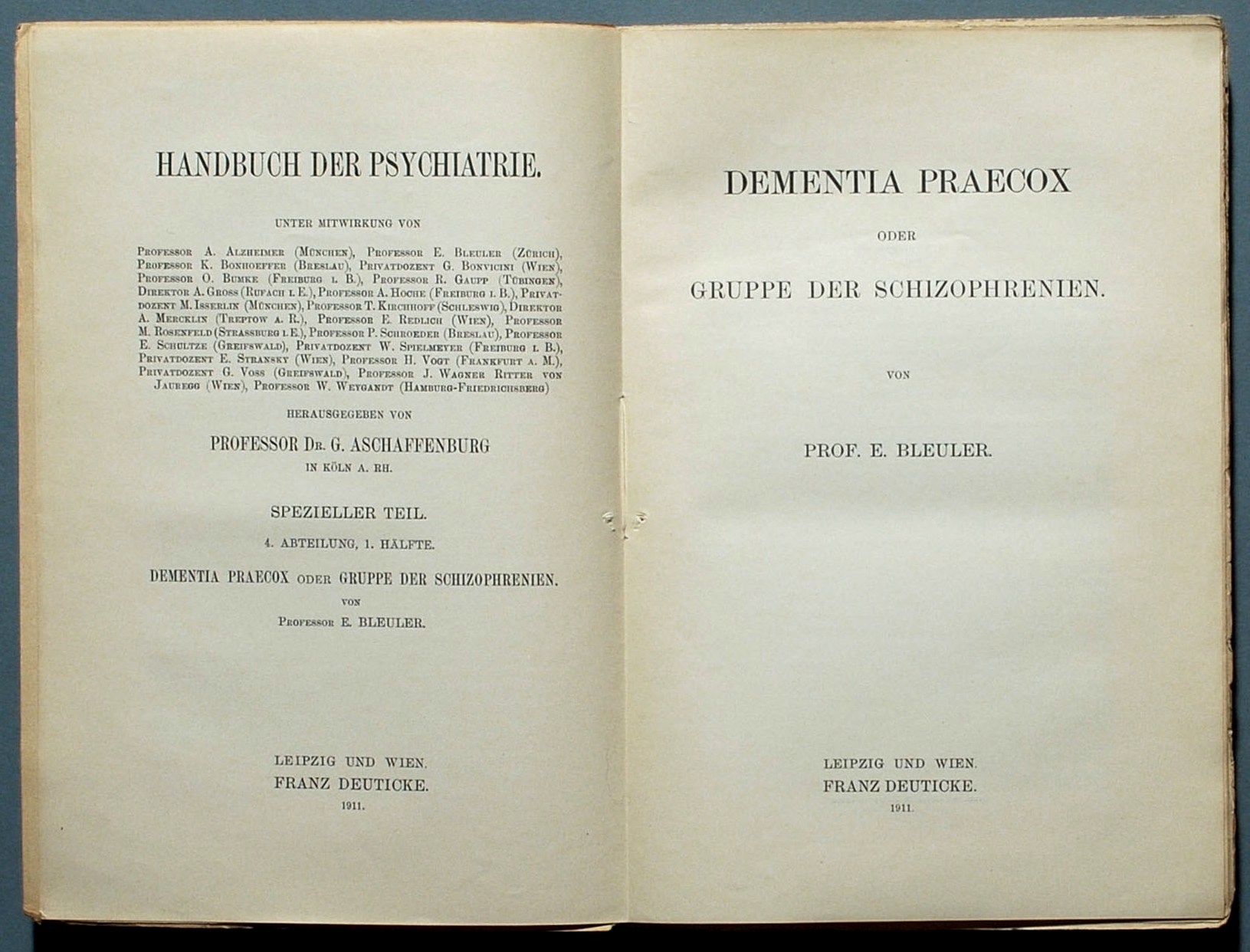 Bleuler, Eugen: Dementia praecox oder Gruppe der Schizophrenien. Leipzig und Wien: F. Deuticke 1911, 420 Seiten. Erstdruck.